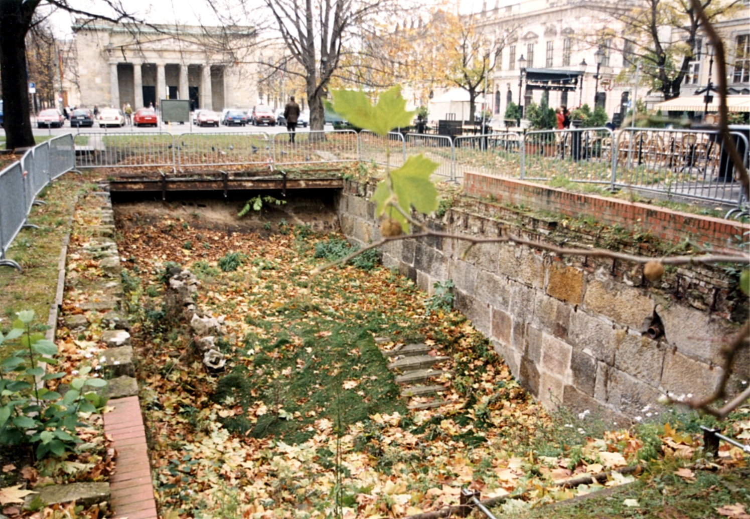 Lindentunnel-Rest Unter den Linden